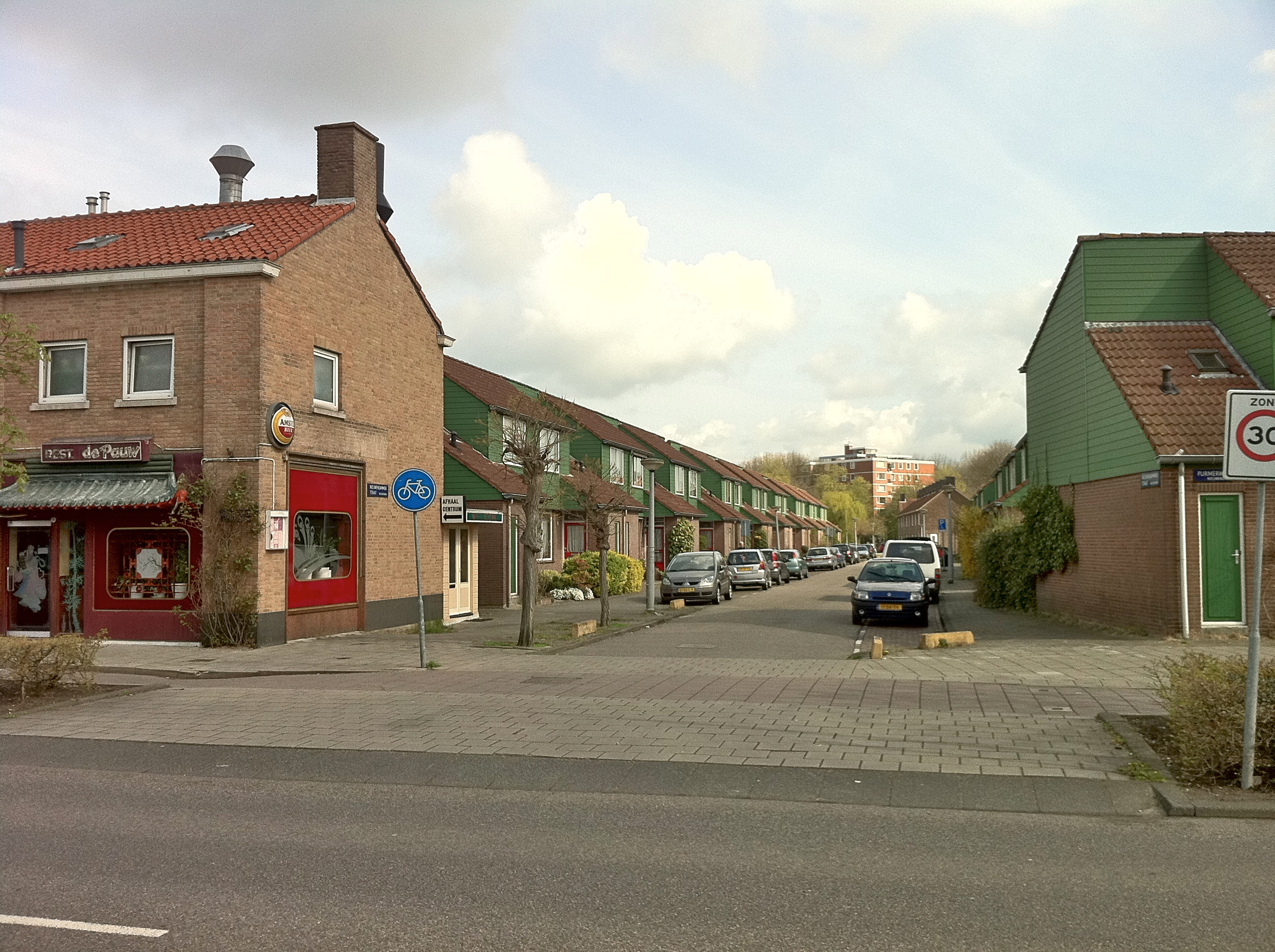 Amsterdam-Noord. Sociale woningbouw uit 1980 van architect Hielke Hoekstra. Jaren 50 bouw van J.H. Mulder, winkelpand van De Gruyter